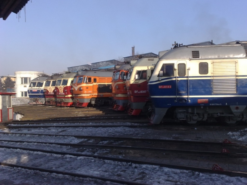 大转盘 QQ696847